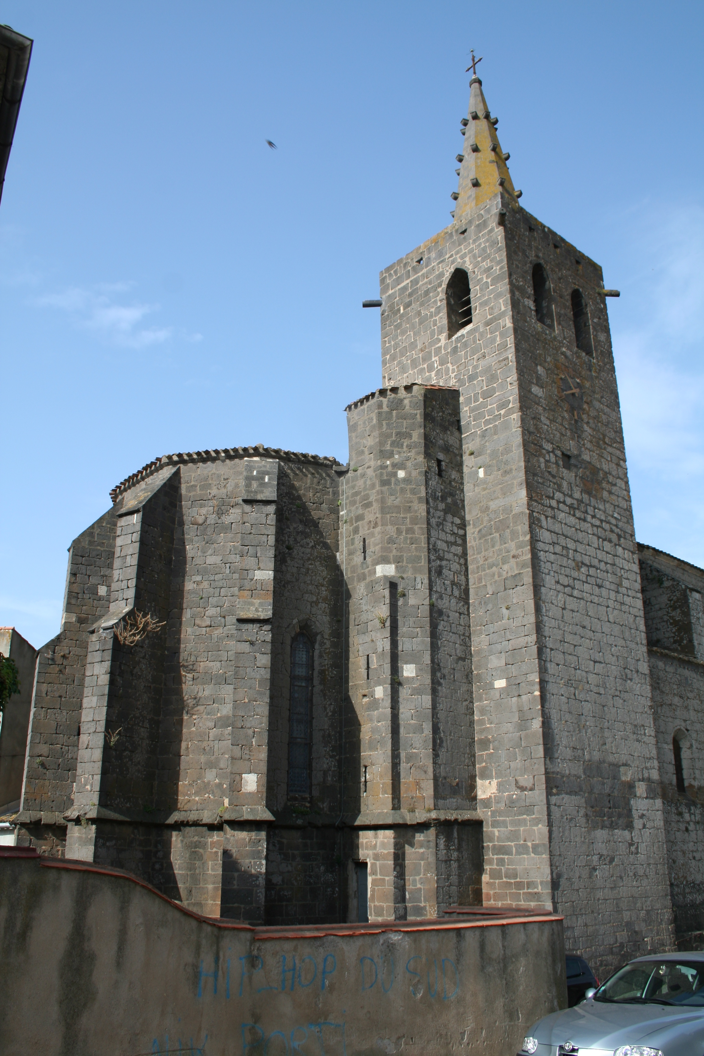 Portiragnes (Hérault) - Chevet de l'église Saint-Félix.